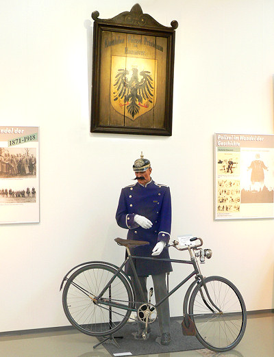 Ausstellungshalle der Polizeigeschichtlichen Sammlung Niedersachsen in Hannover.